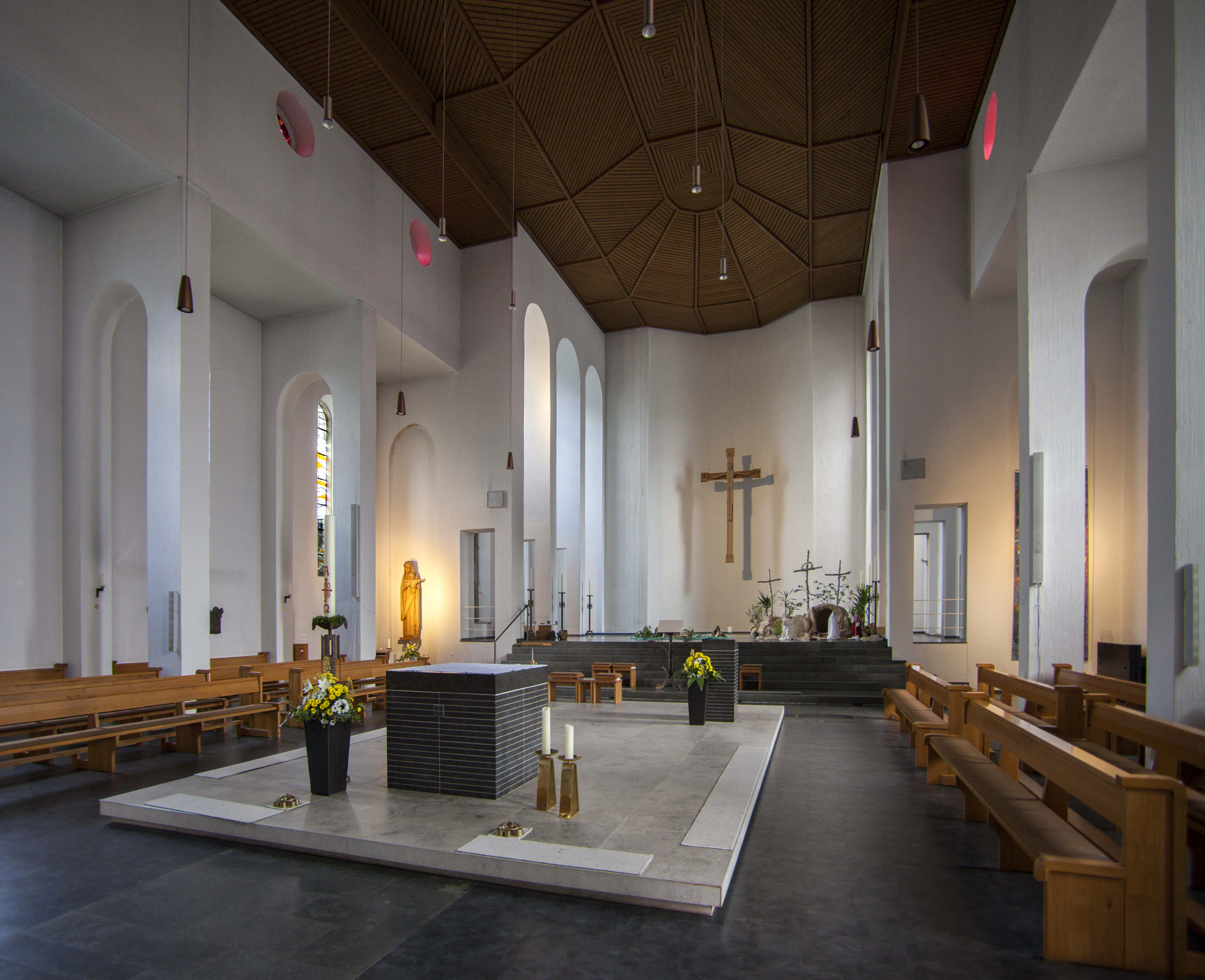 St. Elisabeth Rheine - Altarinsel - Chor